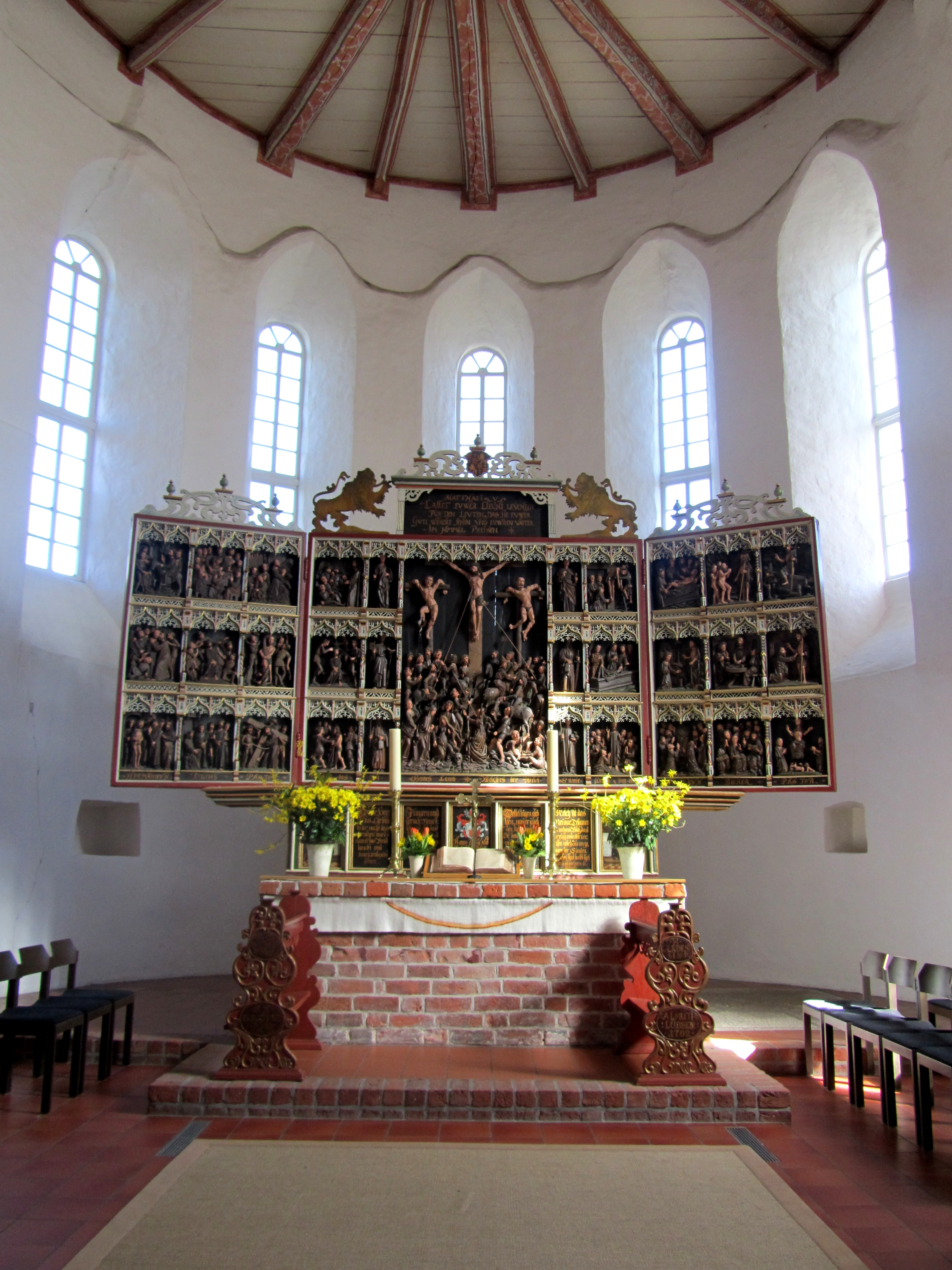 Altar der St.-Stephanus-Kirche in Schortens, Niedersachsen, Deutschland